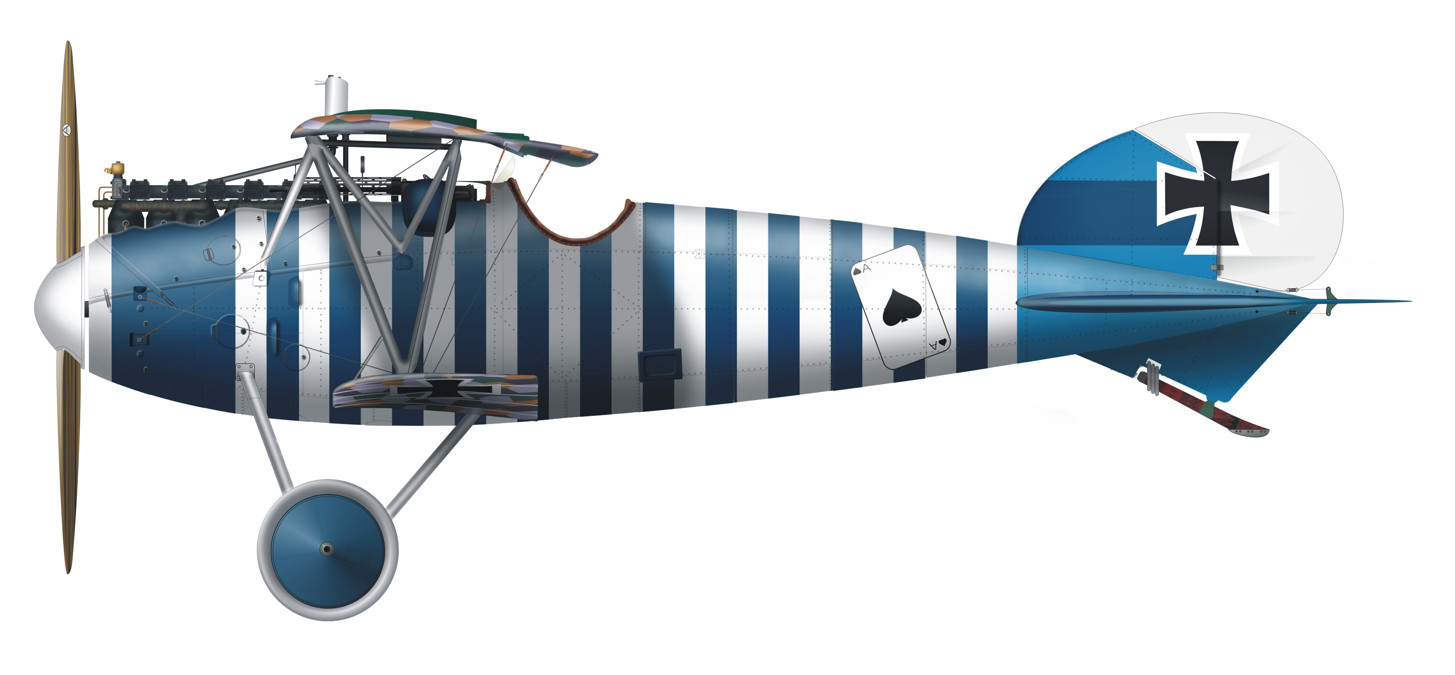 Albatros D.Va, Leutnant Bohning, Jasta 79b